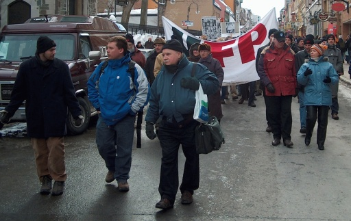 (C) Copyright 2003 Yanik Crépeau Manifestation anti-guerre, Québec, QC 2003-03-15. Cette photo a été prise par moi le 15 mars 2003, à l'occasion de la manifestation contre la guerre en Irak tenue à Québec. L'Union des Forces Progressistes (UFP) tenait son IIIème Conseil de l'Union et avait interrompu ses délibérations afin de permettre aux déléguéEs de participer à cette manif. La plupart des personnes présentes sur cette photo étaient soit déléguéEs au IIIème Conseil de l'Union, soit membre de l'exécutif national de l'UFP ou encore candidatEs pour l'UFP aux élections du 14 avril 2003 au Québec. J'ai utilisé un appareil numérique HP 812 pour réaliser cette photo. J'ai également utilisé un logiciel gratuit, IrfanView pour retailler la photo, diminuer le nombre de couleurs et mieux compresser le tout afin de pouvoir faire tenir le document en dessous de 100K. Yanik Crépeau 4 avr 2004 à 22:30 (CEST)